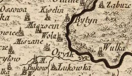 Wola Uhruska na mapie Carte de la Pologne divisée par provinces et palatinats et subdivisée par districts construite par J. A. B. Rizzi Zannoni, Paryż 1772